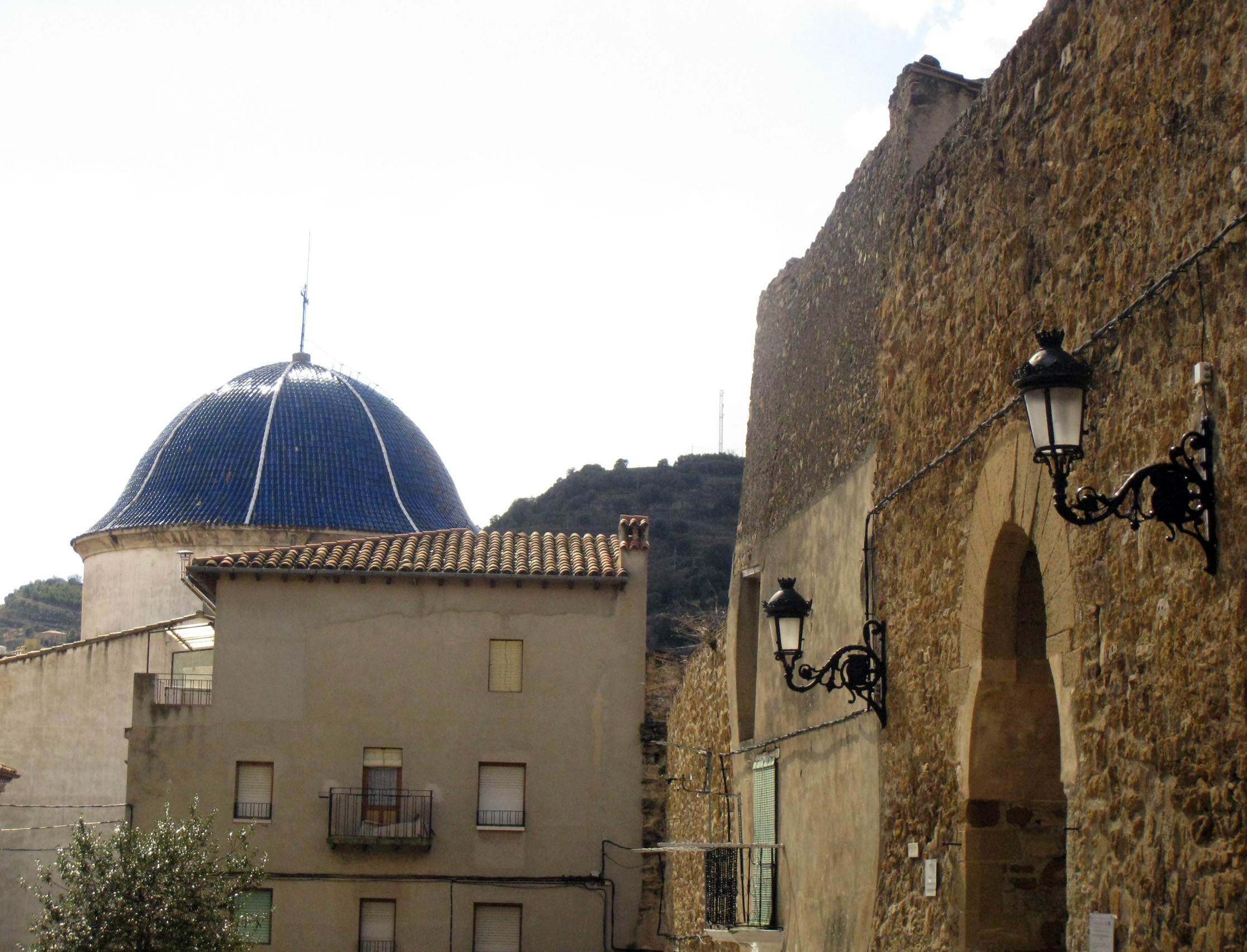 Arc_de_la_Mola_i_cúpula_de_l'Assumpció_(Benassal)